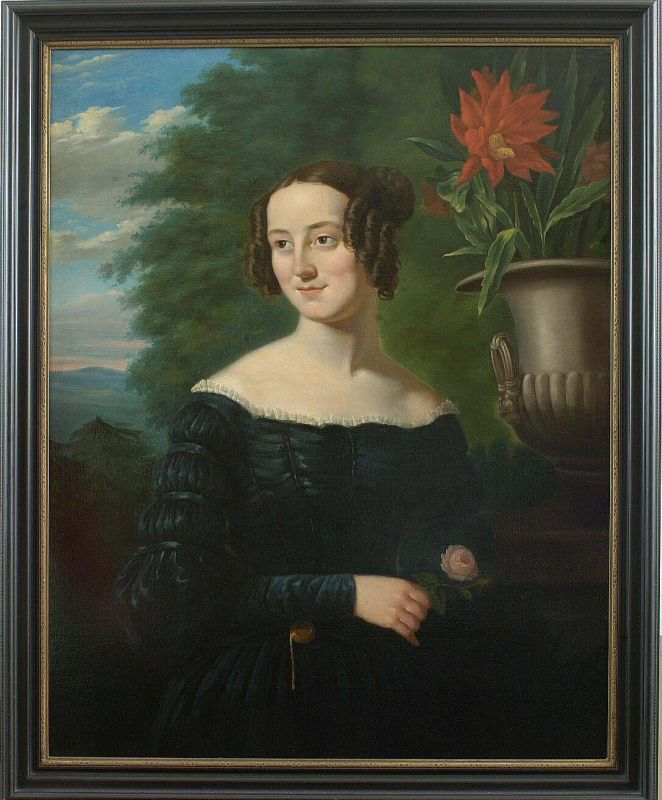 Olieverfschilderij. Olieverfschildering op linnen in lijst voorstellende Berthe Hoola van Nooten geboren Van Dolder (Wageningen 1817/Batavia 1892). Op 11-7-1838 trouwt zij met Mr. Dirk Hoola van Nooten (Demerary West Indië 3-5-1811-New Orleans 13-9-1847). Waarschijnlijk is dit portret gemaakt vlak na hun huwelijk. Van haar echtgenoot is ook een portret gemaakt maar waar dit pendant zich bevindt is onbekend. Mogelijk is het bij verre familie in Australië. We zien de jonge Berthe afgebeeld ten halve lijve in een zwarte jurk met in haar hand een roos (symbool van de liefde). Op haar middel een ceintuursieraad. De achtergrond is of fantasie of is mogelijk een verwijzing naar het geboorteland van haar echtgenoot. Ook de klassieke vaas op piedestal met tropische cactus wijst ons mogelijk in die richting. De Selenicereus, afkomstig uit Zuid-Amerika wordt ook wel Koningin van de Nacht genoemd, de grote en exotische bloem, bloeit slechts 1 tropennacht lang. Na het overlijden van haar echtgenoot, als hoofd van een school in New Orleans , blijft zij in 1847 met 5 kinderen achter. Teneinde in hun levensonderhoud te voorzien, zet zij het onderwijs in New Orleans, Plaquemine en Galveston en in 1856 in Batavia voort. Later geeft zij ook tekenles en illustreert het botanische werk "Fruit, Fleurs et Feuillages, choissis de l'ile de Java" uitgegeven in Brussel in 1863, dat zij opdraagt aan Koningin Sophie. Voor een necrologie zie bij P&I tabblad overige.. Olieverfschildering, portret van Berthe Hoola van Nooten door M. Calisch